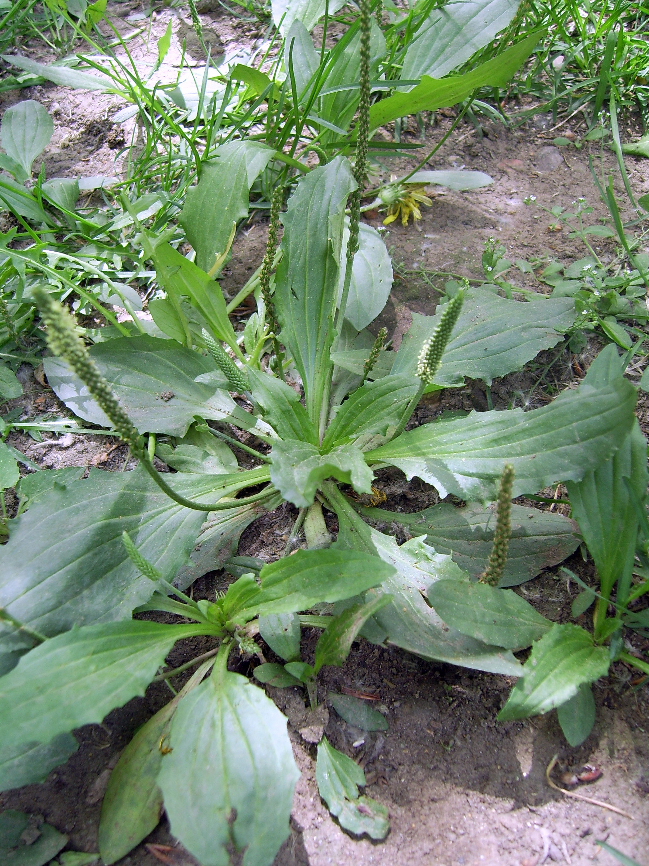 Plantago asiatica 车前草，摄于北京